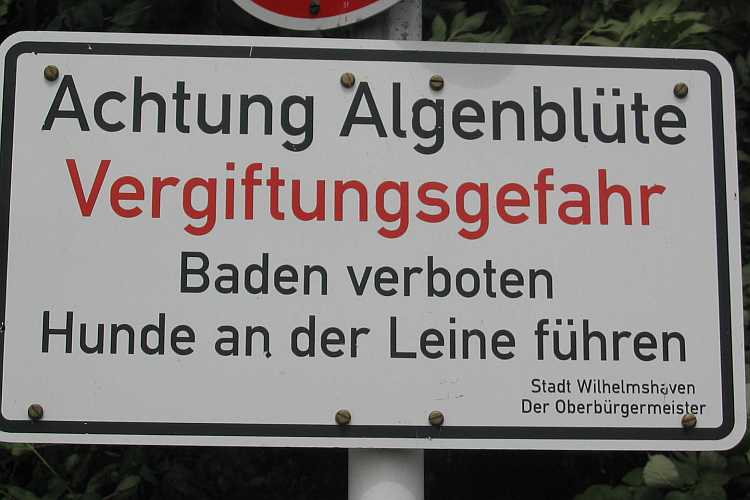 Badeverbot wegen Algenblüte am Bantersee in Wilhelmshaven